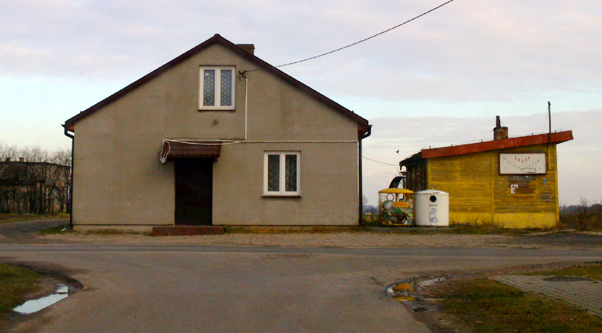 Świetlica wiejska w Piskorczynie